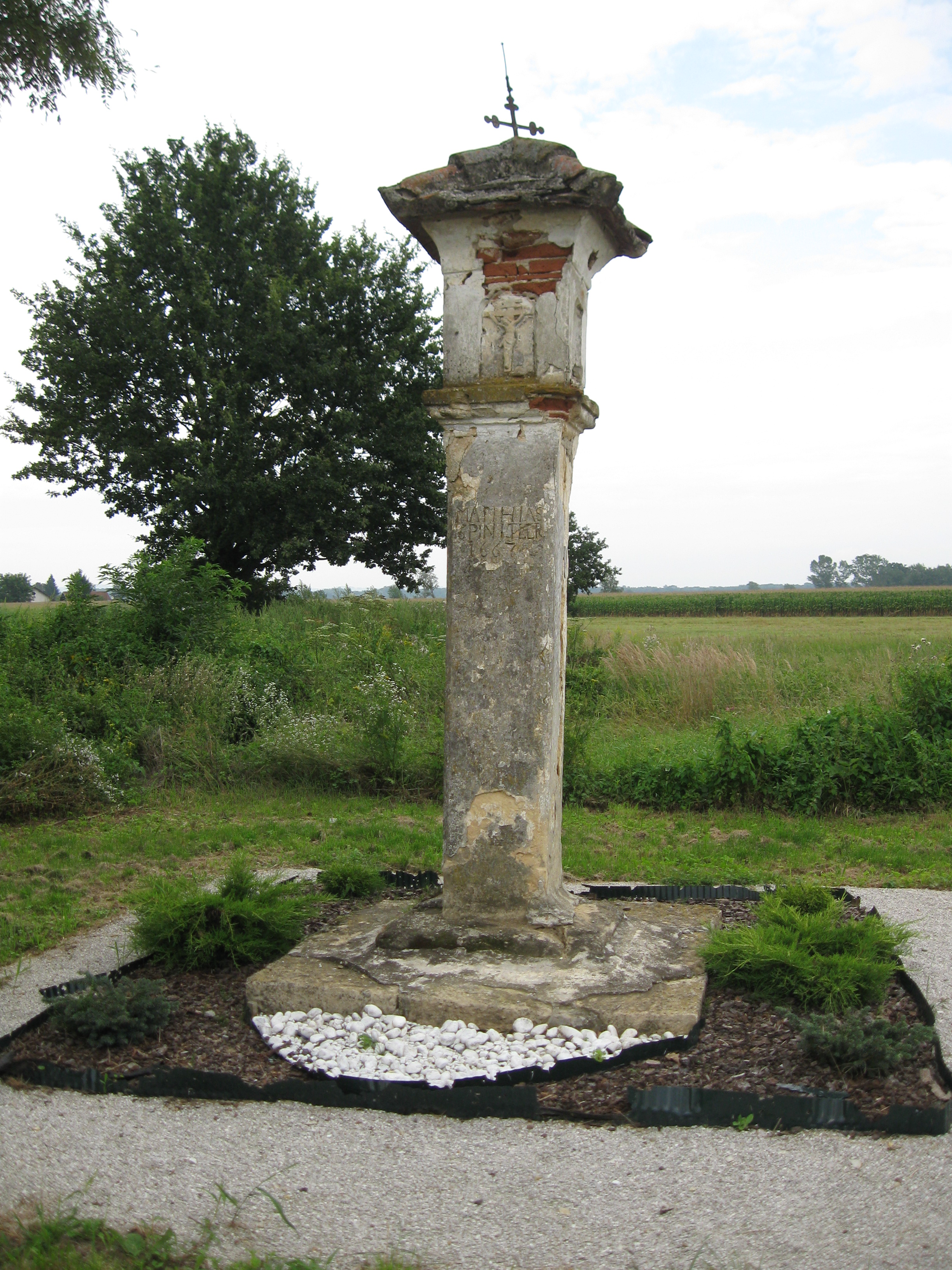 Kužno znamenje v vasi Plitvica v občini Apače, z napisom letnice 1667.